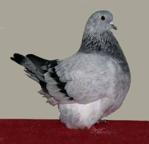 French Mondain (Blue Grizzle)